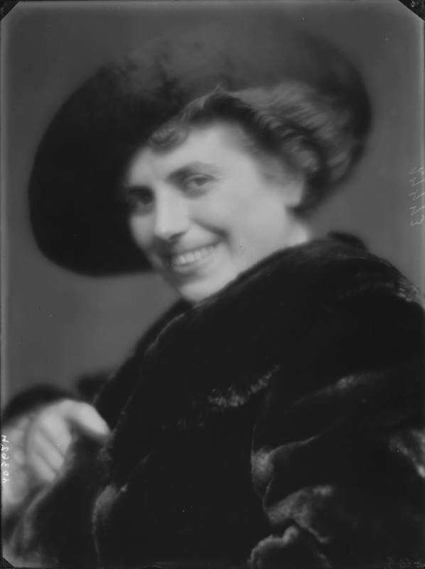 soprano Lina Pasini Vitale